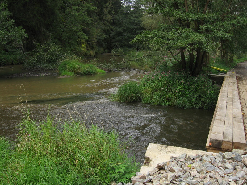 Kosí potok na soutoku se Mží. Kosí potok přitéká zprava.